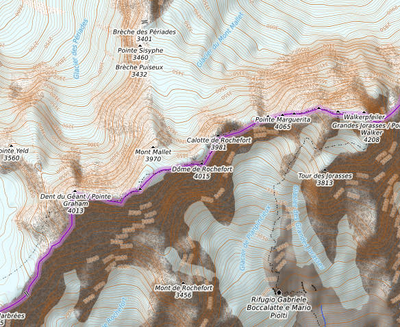 Carte réalisée sur umap This map may be incomplete, and may contain errors. Don't rely solely on it for navigation.